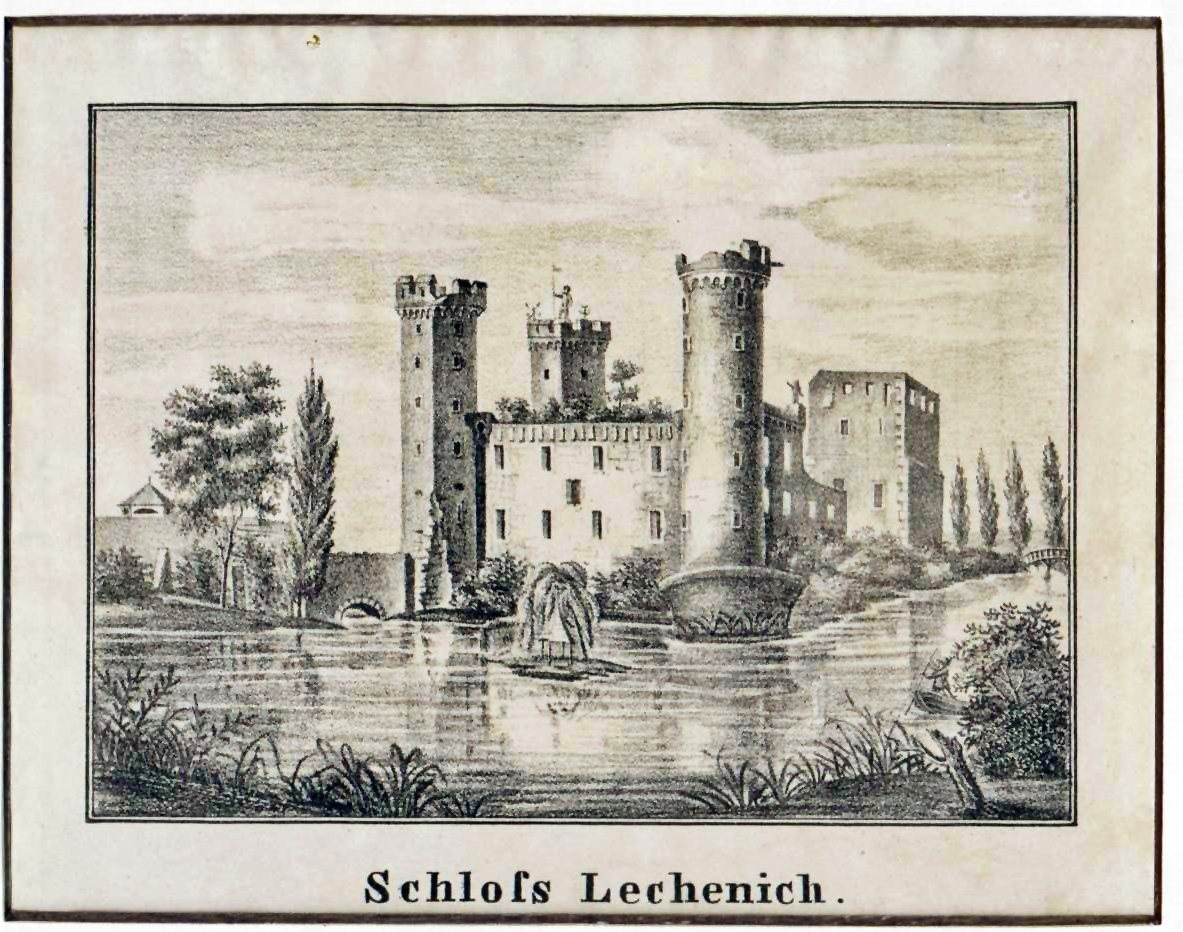 Schloss zu Lechenich, Lithografie um 1840